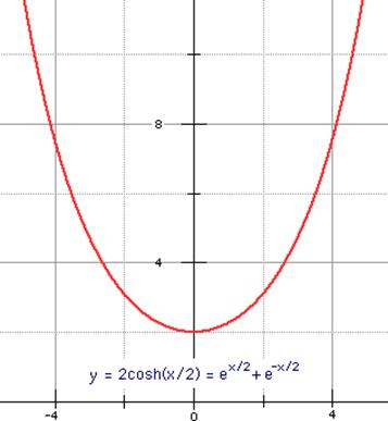 Formule de la forme dite "chainette" utilisée pour les voutes